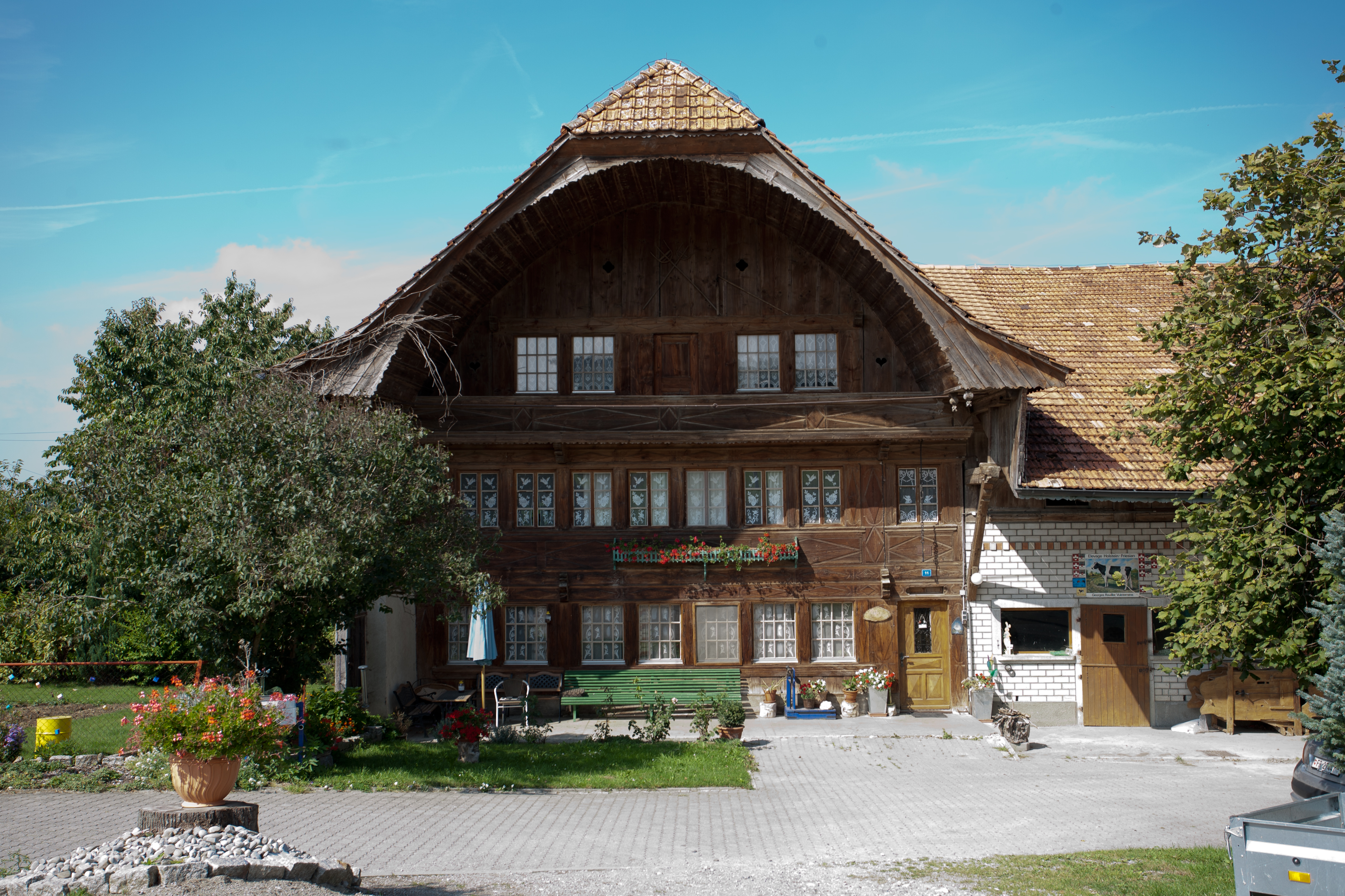 Vuisternens-devant-Romont Ferme